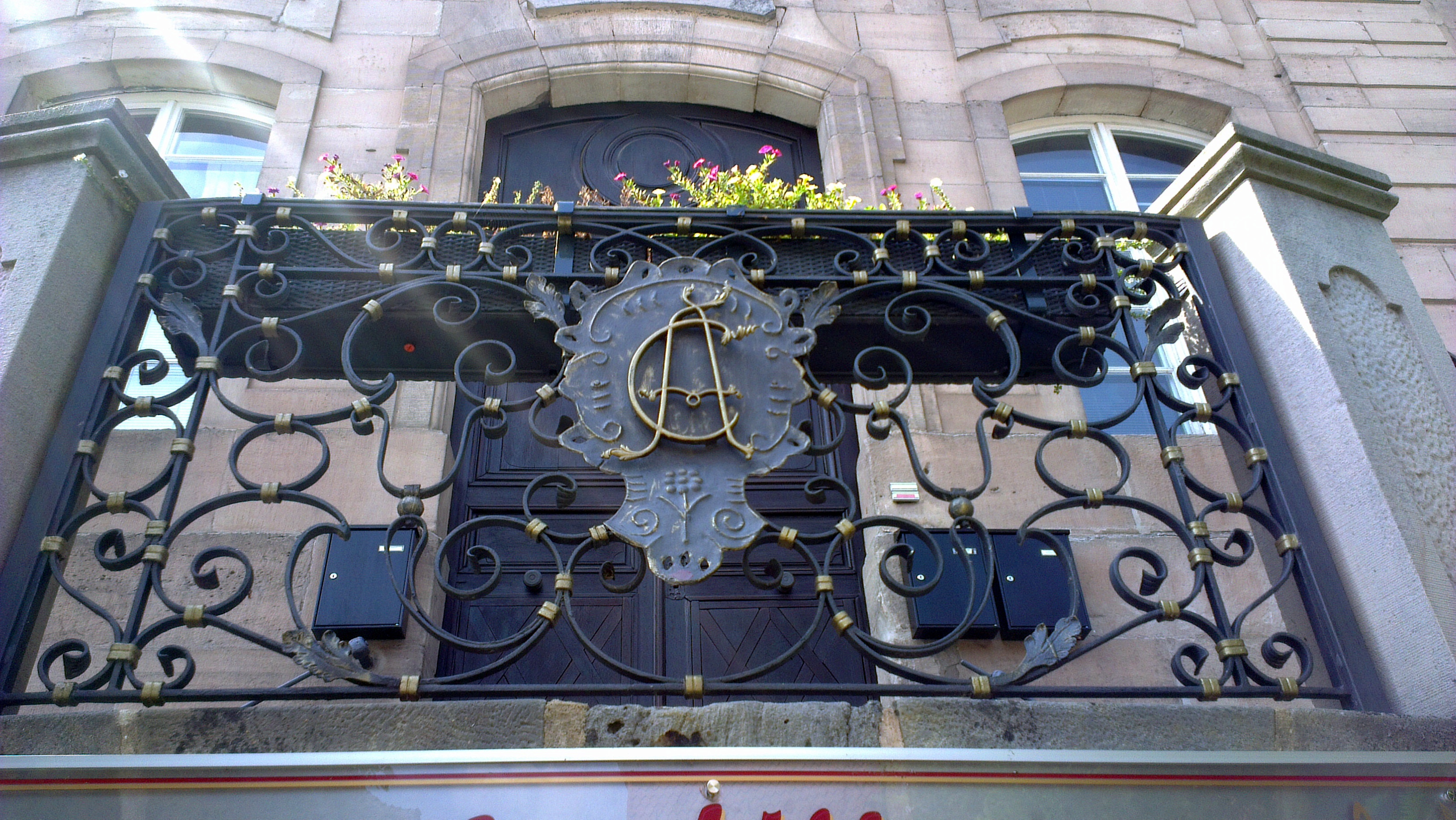 Ehemaliges Verwaltungsgebäude des Ritterkantons Altmühl - Ritterhaus in Wilhermsdorf – Schriftzug des Ritterkanton Altmühl